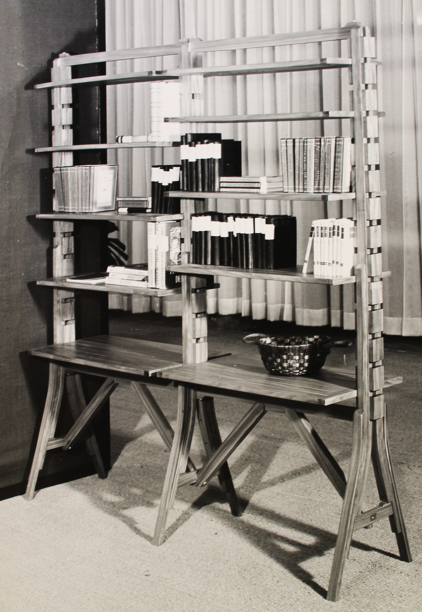 Libreria Cavalletto. Foto dall'archivio privato di Lodovico Meneghetti